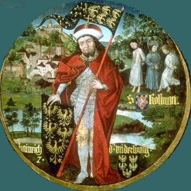 Heiligenmacher Heinrich I. mit Koloman im Hintergrund Babenberger Stammbaum, 1489-92, Stift Klosterneuburg